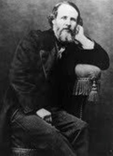 O 5º Marquês de Soydos